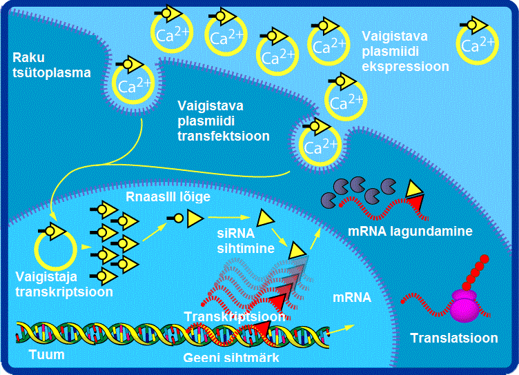 RNA interferents looma rakus